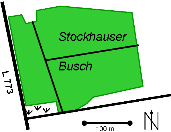 Karte des Stockhauser Busches